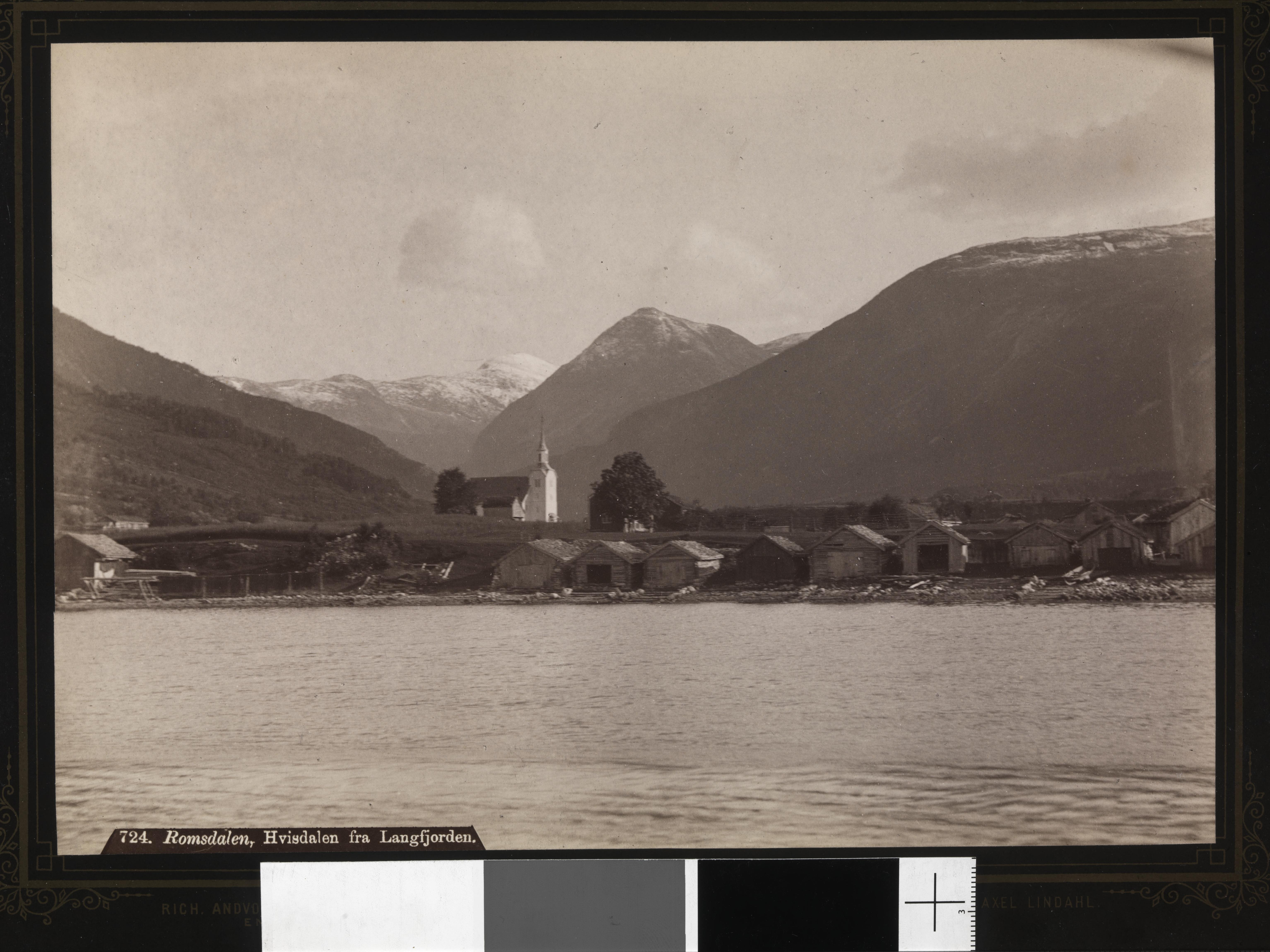 Bildet er hentet fra Nasjonalbibliotekets bildesamling Vistdal, Nesset, Møre og Romsdal